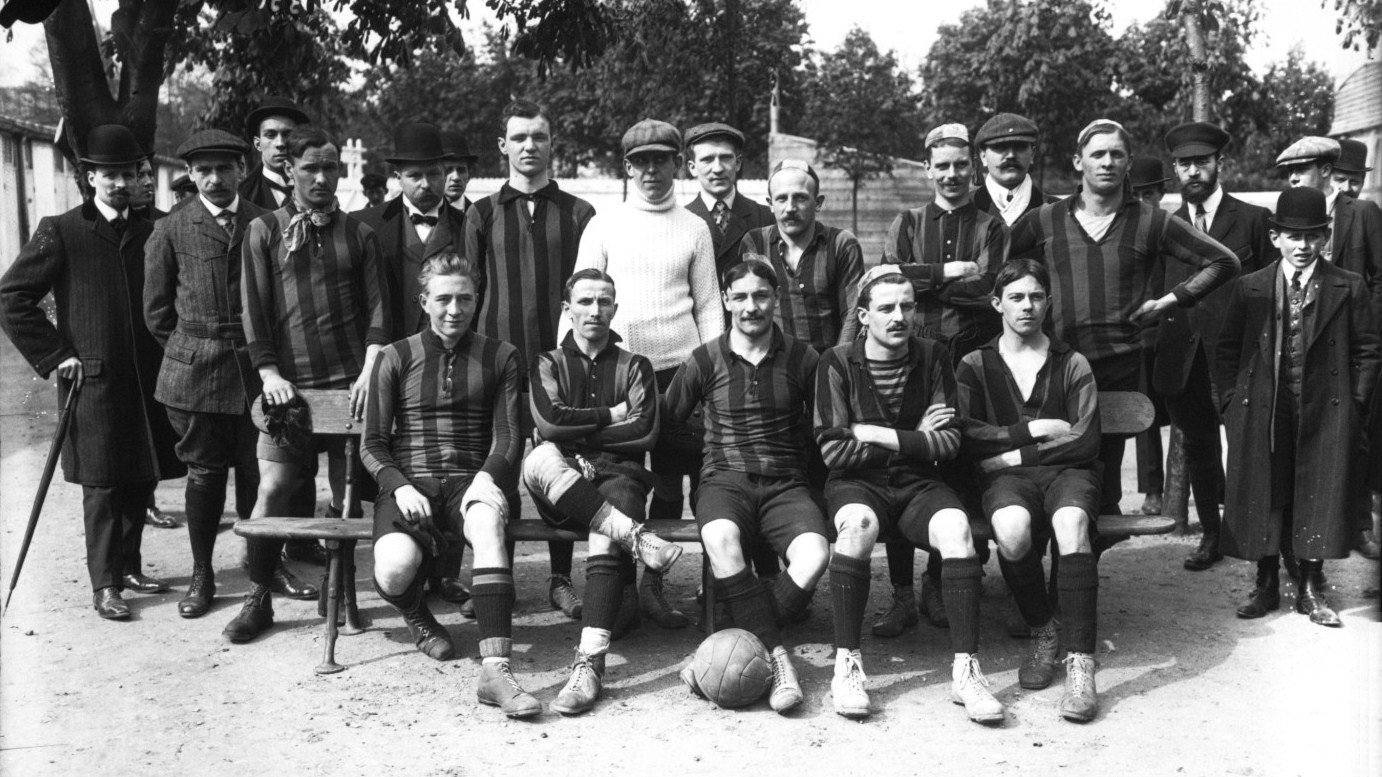 Stade hélvétique de Marseille le 1er mai 1910 avant la finale du championnat de France de football USFSA.